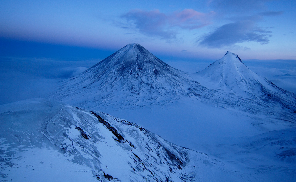 Высочайшие вулканы Камчатки и Евразии. Ключевская сопка 4850 метров, Камень - 4580 метров (справа)